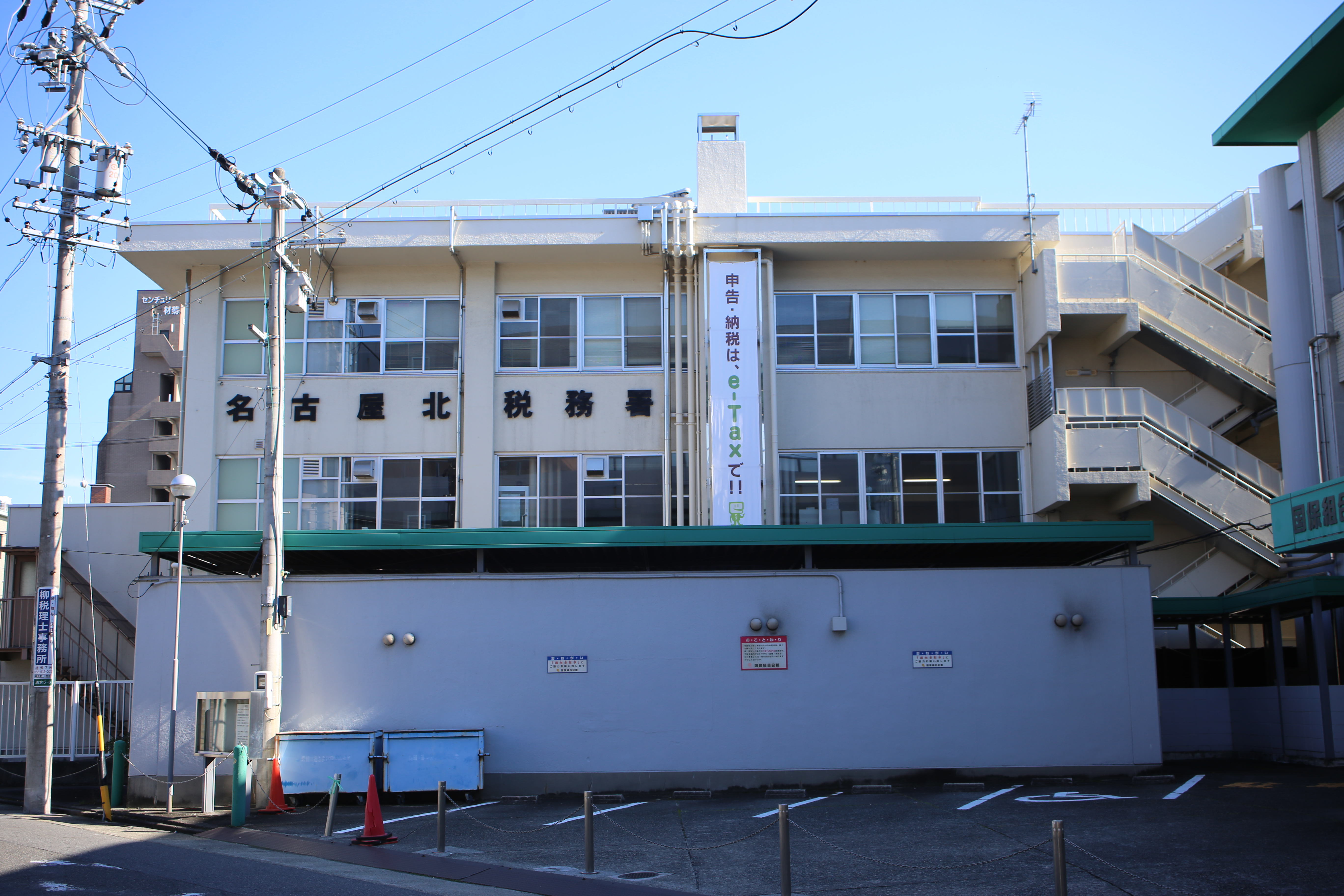 名古屋市北区清水五丁目の名古屋北税務署